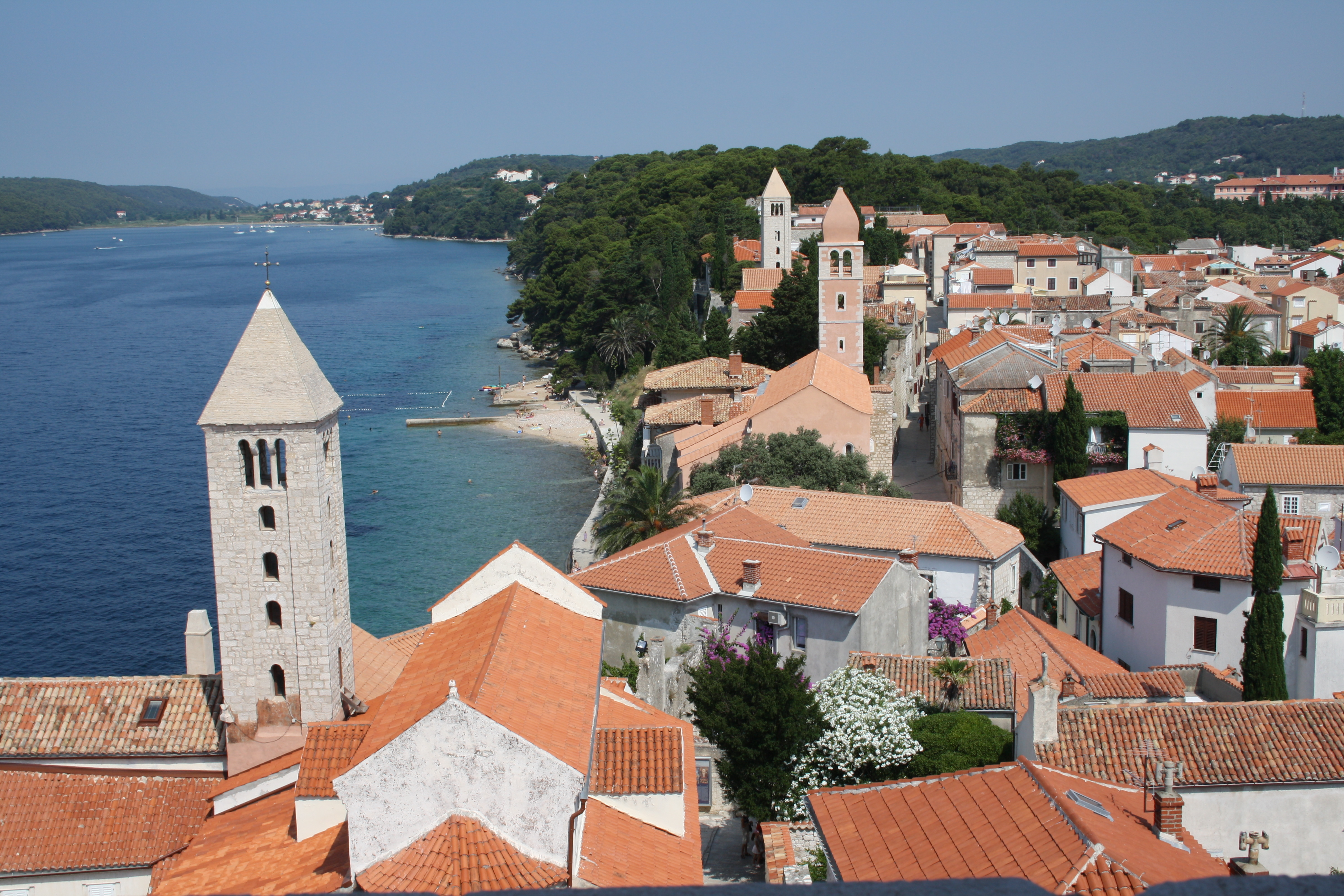 Vista del centro di Rab dal campanile del duomo.